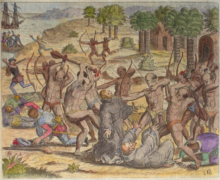 Reacción de los indígenas, contra frailes y soldados, 1515